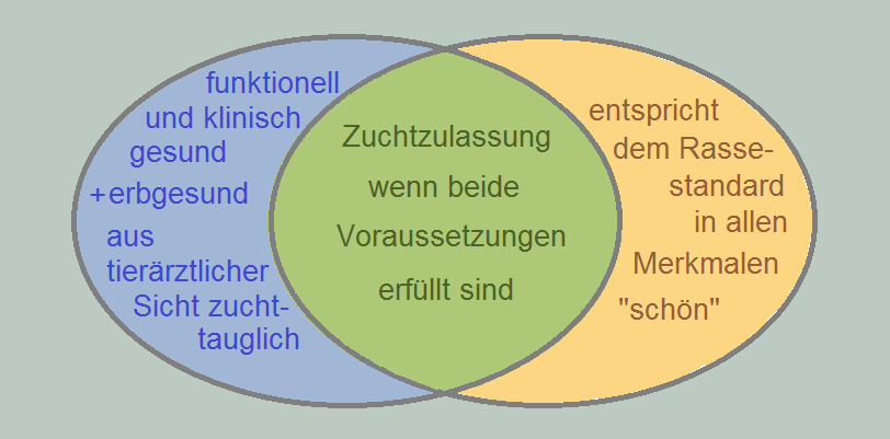 Zuchttauglichkeit und Zuchtzulassung